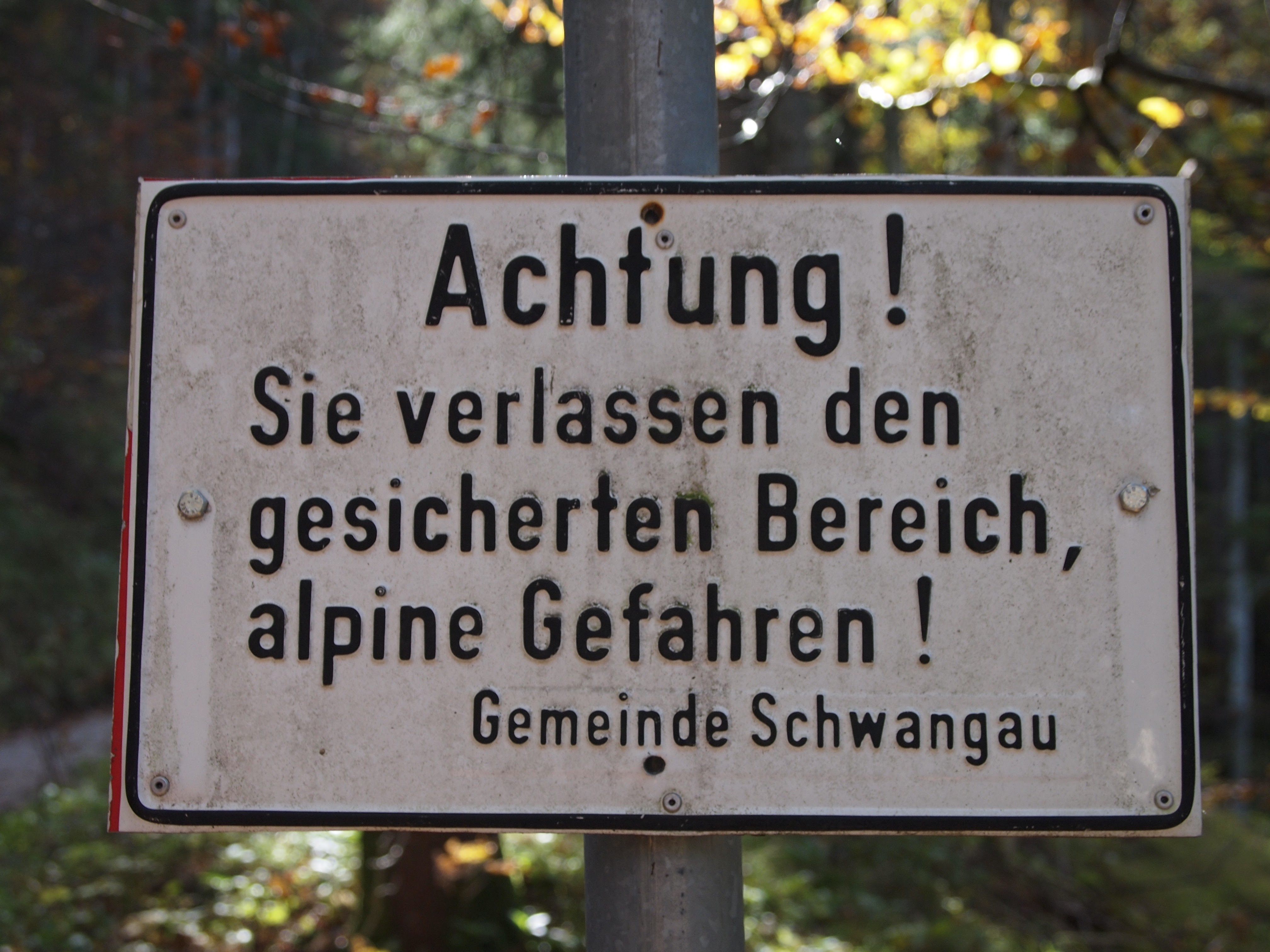 Schild auf dem Weg zum Säuling: "Achtung! Sie verlassen den gesicherten Bereich, Alpine Gefahren! Gemeinde Schwangau"